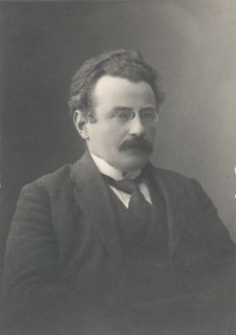 Wilhelm Süss, saksa klassikaline filoloog